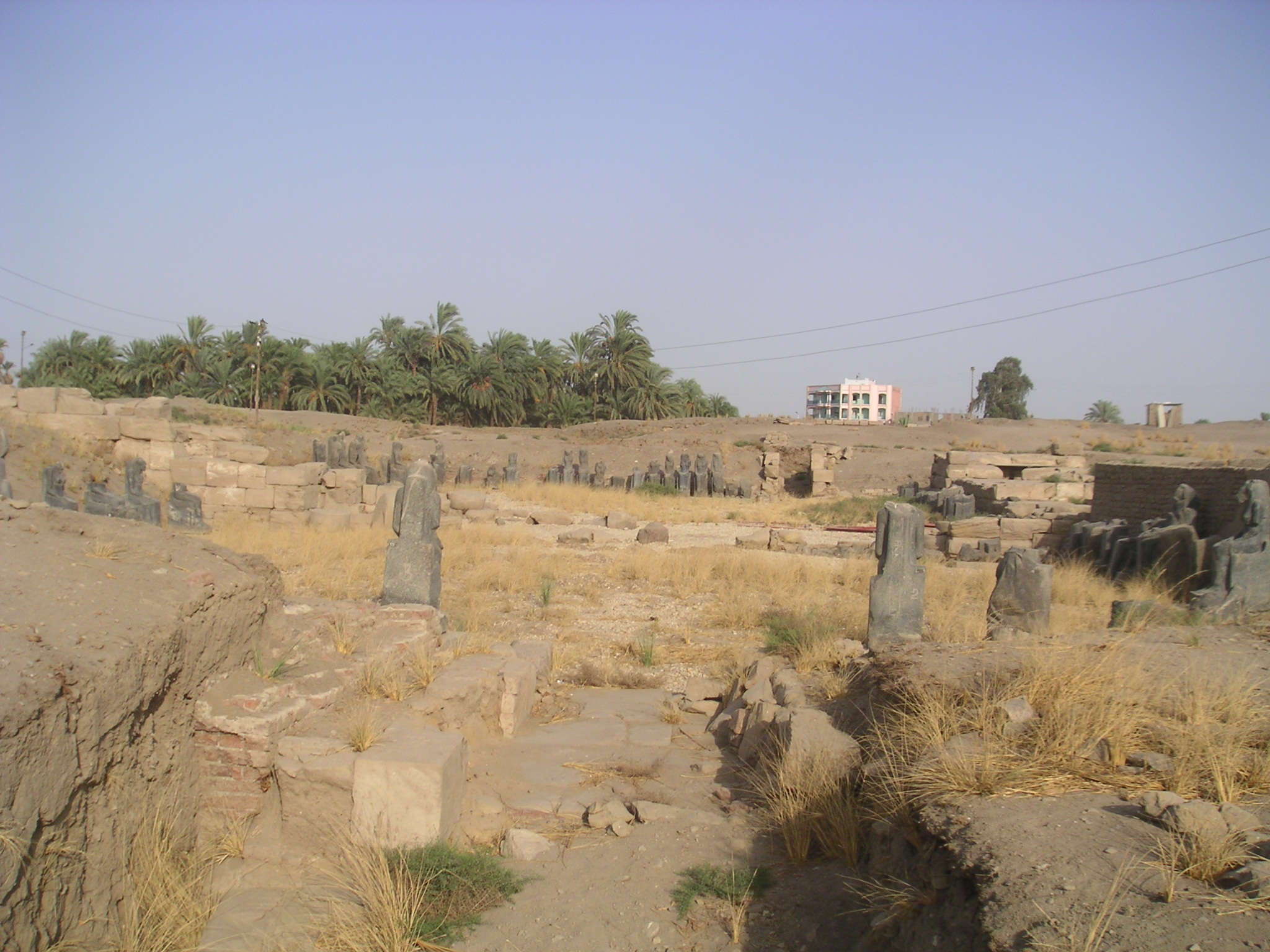 Vue d'une des cours du temple de Mout à Karnak - Louxor - août 2005